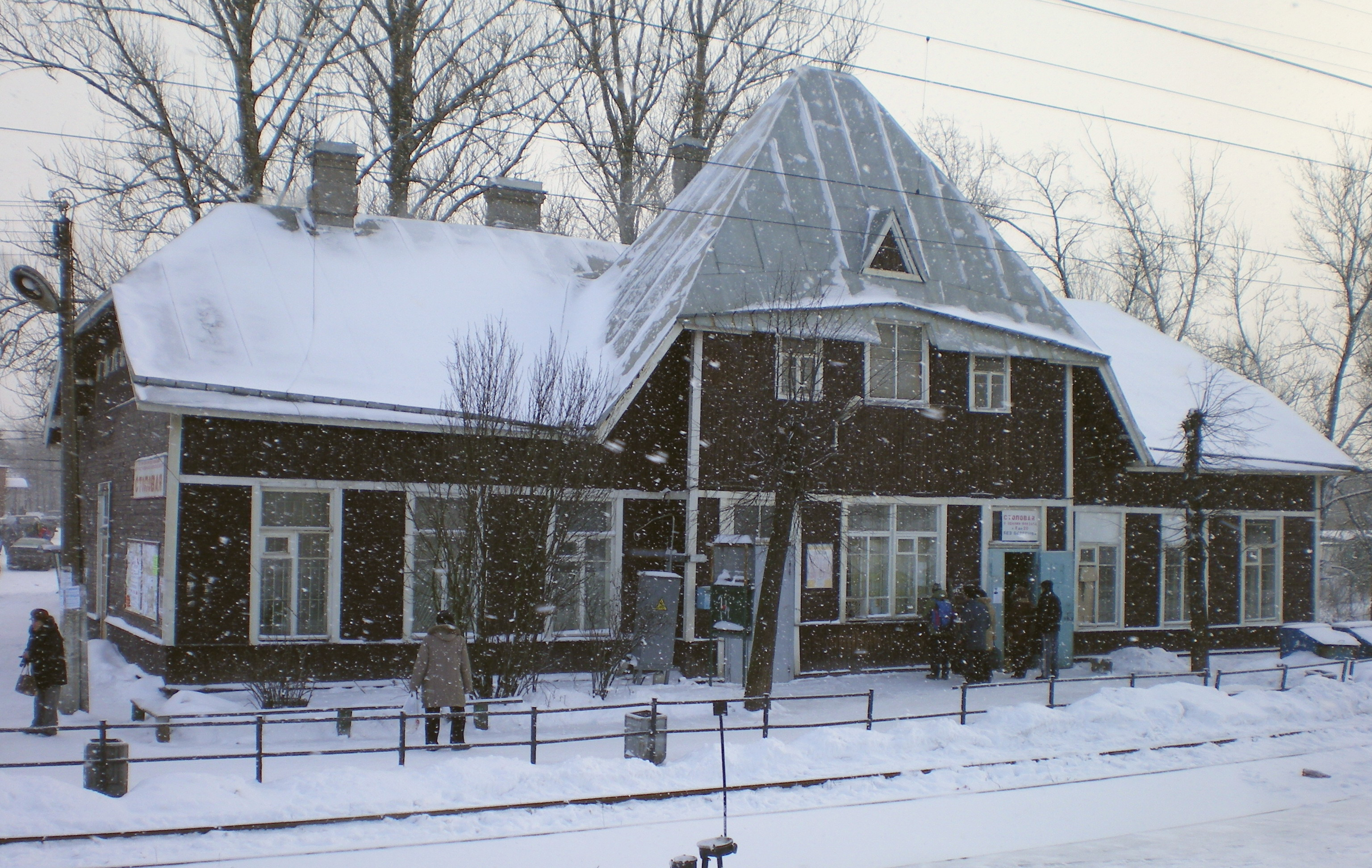 Станция «Токсово»